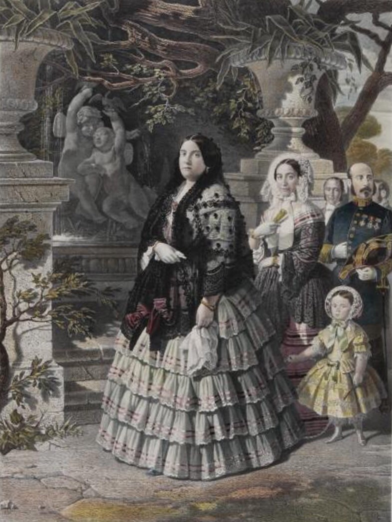 Litografía que representa a la reina Isabel II con su hija la princesa de Asturias y su aya la marquesa de Novaliches, de paseo por los jardines de la Quinta del Pardo.